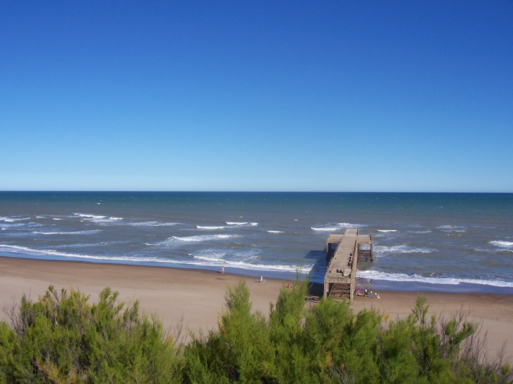 El muelle de pescadores en la ciudad de Necochea, Argentina.